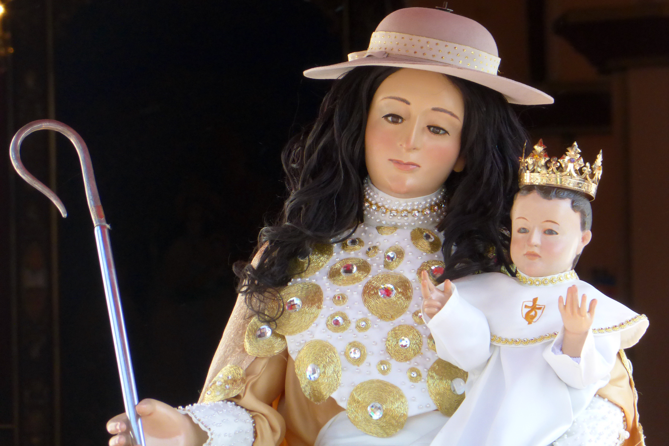 Imagen perfil de la Divina Pastora en la entrada del Templo de Santa Rosa.